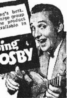 Bing Crosby